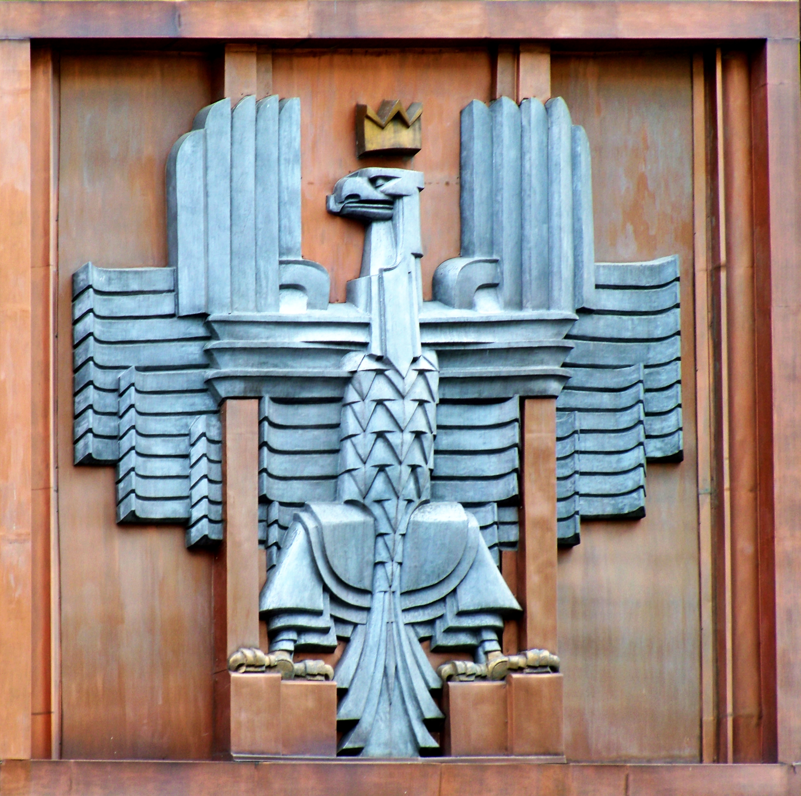 Urząd Telekomunikacyjny i Telegraficzny, polskie godło (1934), ul. Nowogrodzka 45 w Warszawie.